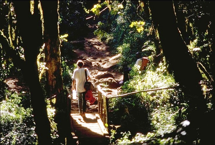 Kilimanjaro National Park - Tanzania